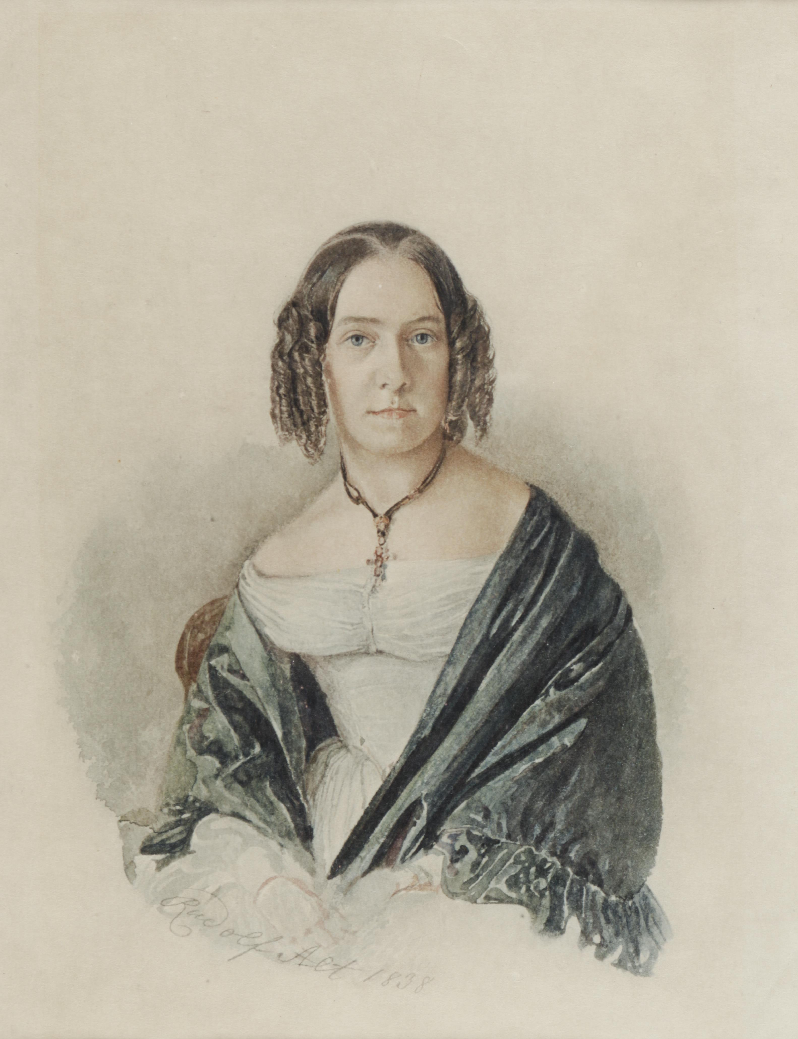 Damenporträt, unten signiert und datiert: Rudolf Alt 1838, Aquarell auf Papier, ca. 22 x 17 cm